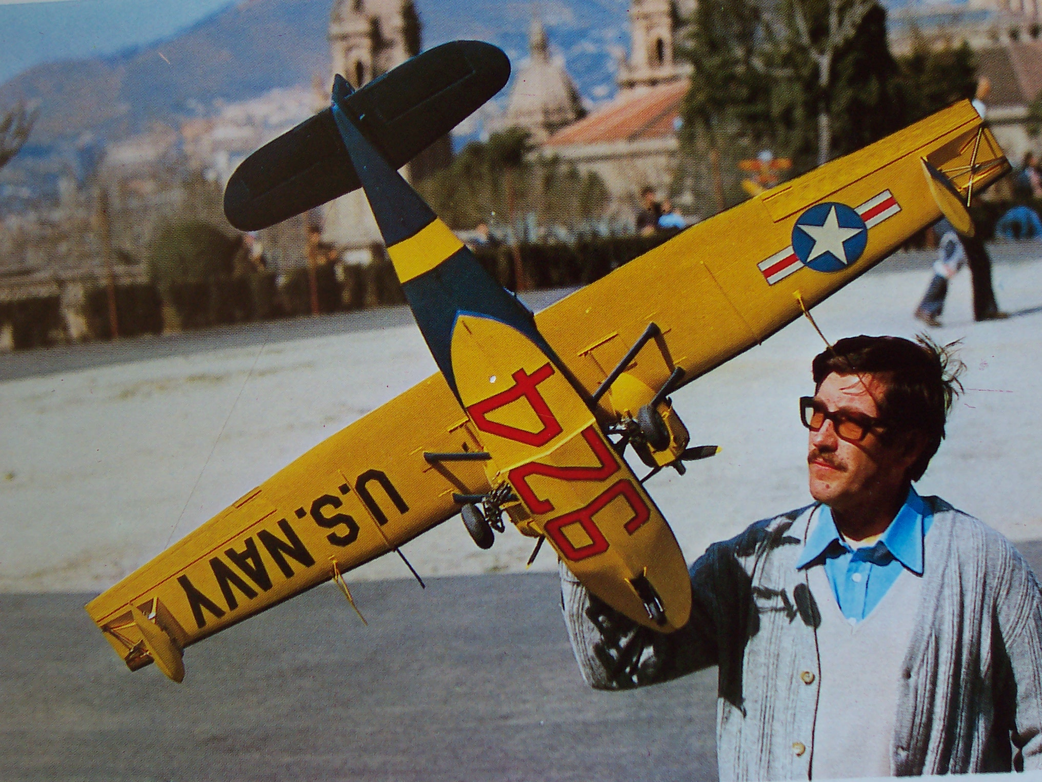 Consolidated PBY Catalina. Maqueta de volcircular feta pels germans Conills (Barcelona)